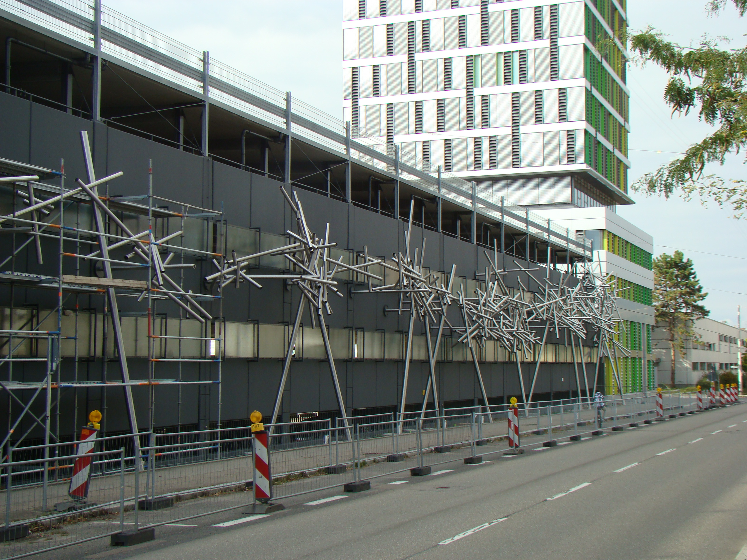 Aufbau der Skulptur von Gunther Stilling am Parkhaus des Landratsamts in der Oststraße in Heilbronn